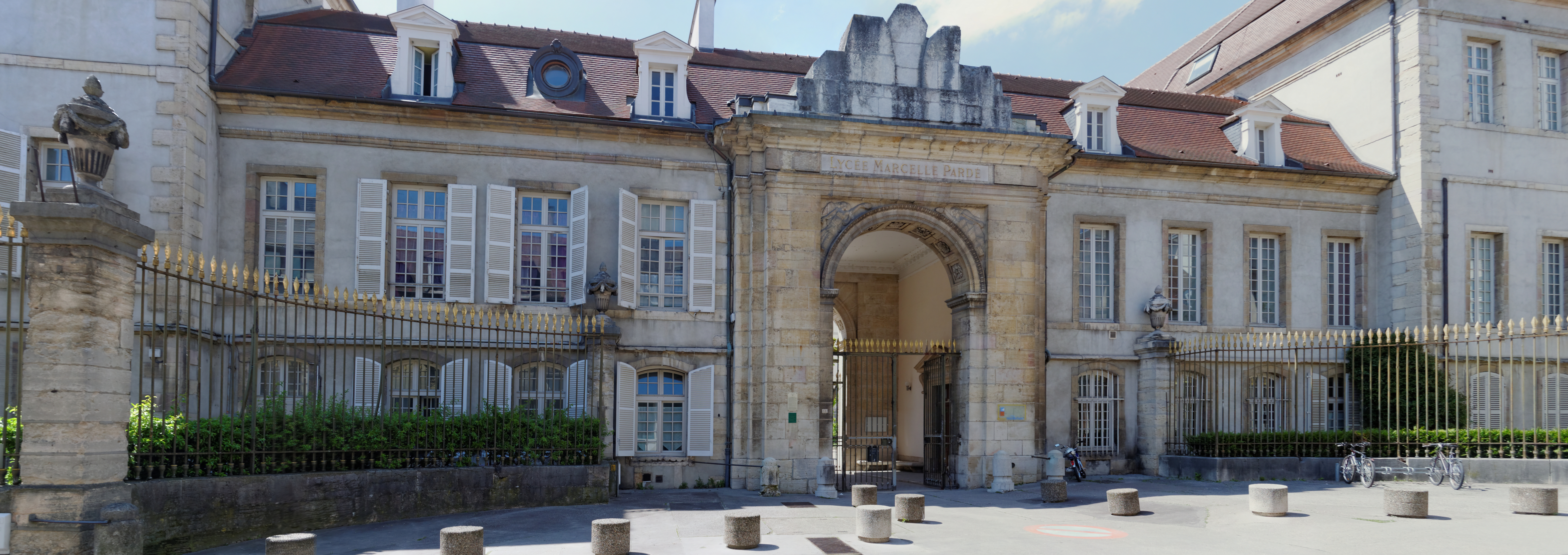 Collège Marcelle-Pardé (ancien lycée Marcelle-Pardé) situé 18, rue Condorcet, à Dijon.